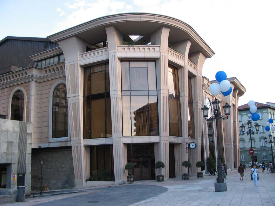 Descripción: Imagen del auditorio de Oviedo, Asturias, España. Fuente: Foto tomada por Rodrigouf el 21 de octubre de 2005. Otra versión: CUADRADO